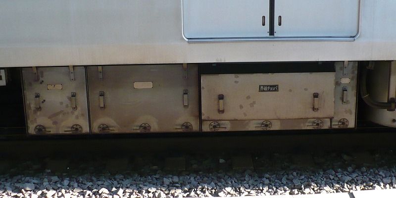 地下鉄03系機器